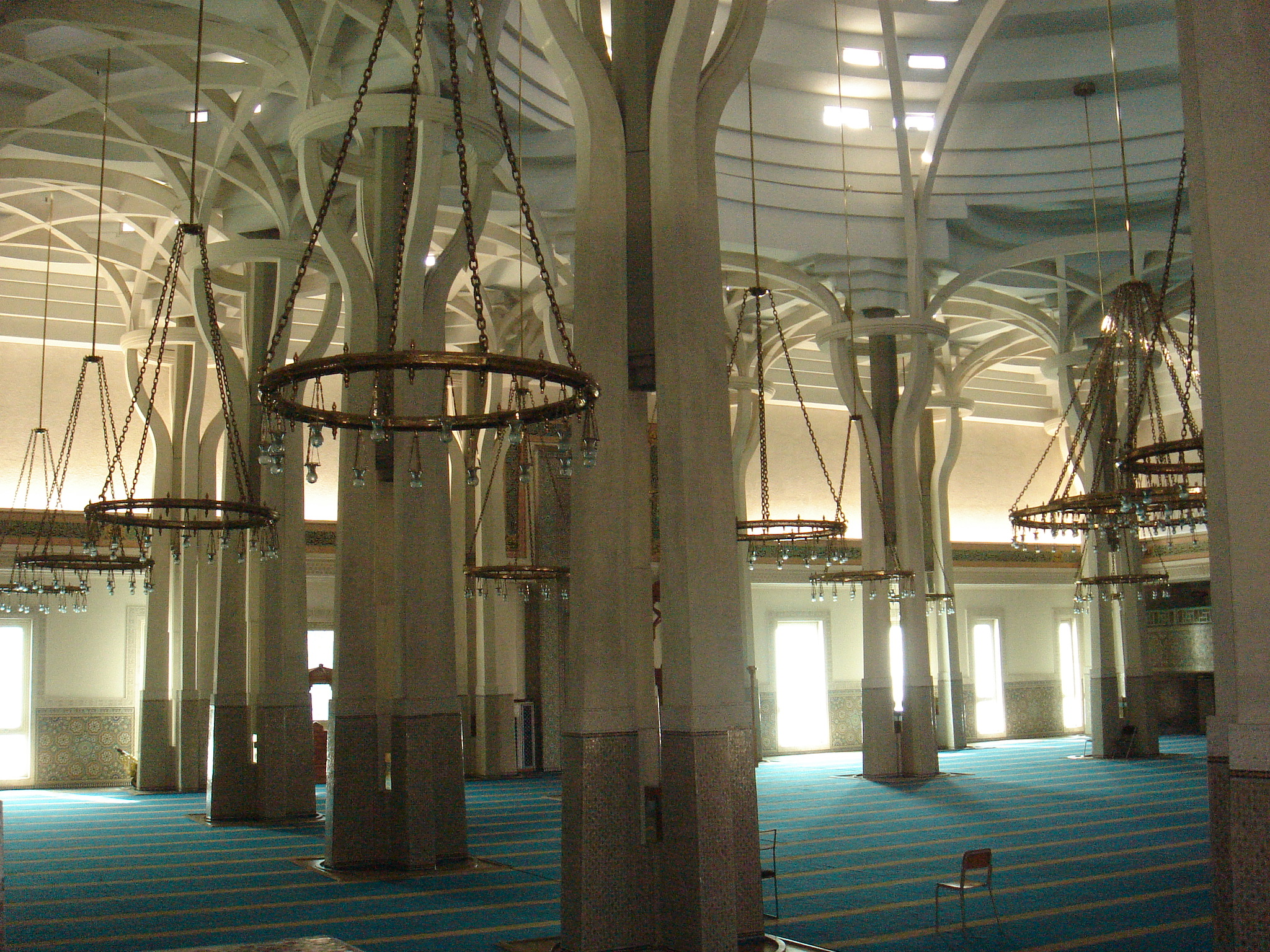 Roma, la Moschea: colonne.